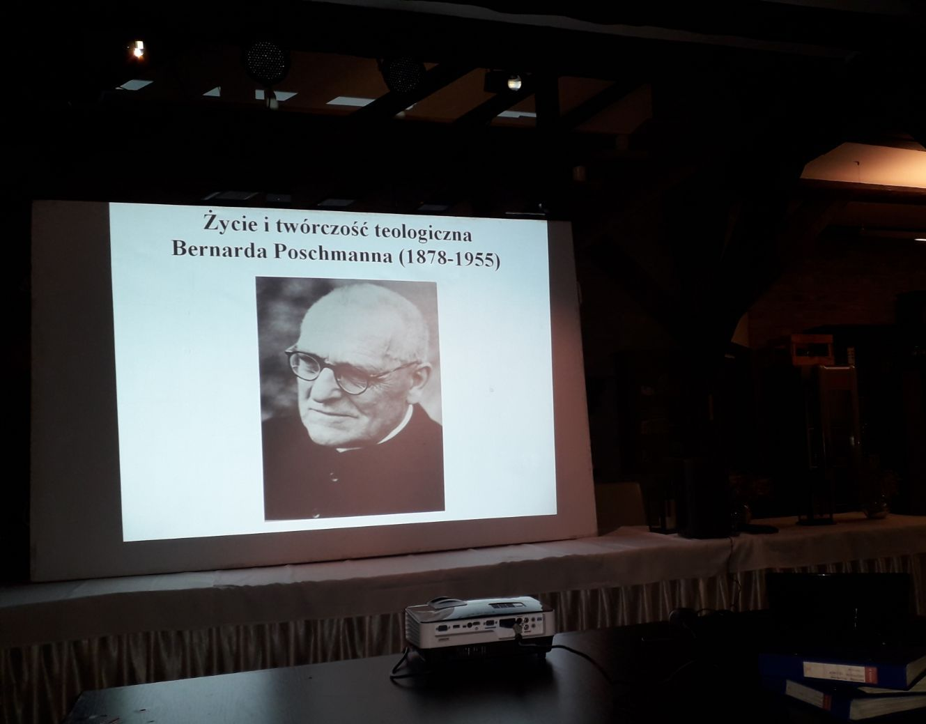 Bernhard Poschmann W dniu 22.02.2018 r. o godz. 18 w Spichlerzu Mariackim odbył się wykład pt. Słynny braniewianin Bernhard Poschmann, który poprowadził ks. dr Wojciech Zawadzki.